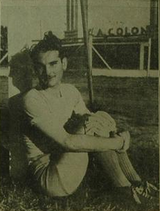 Pedro Botazzi, en su época de Colón de Santa Fe.